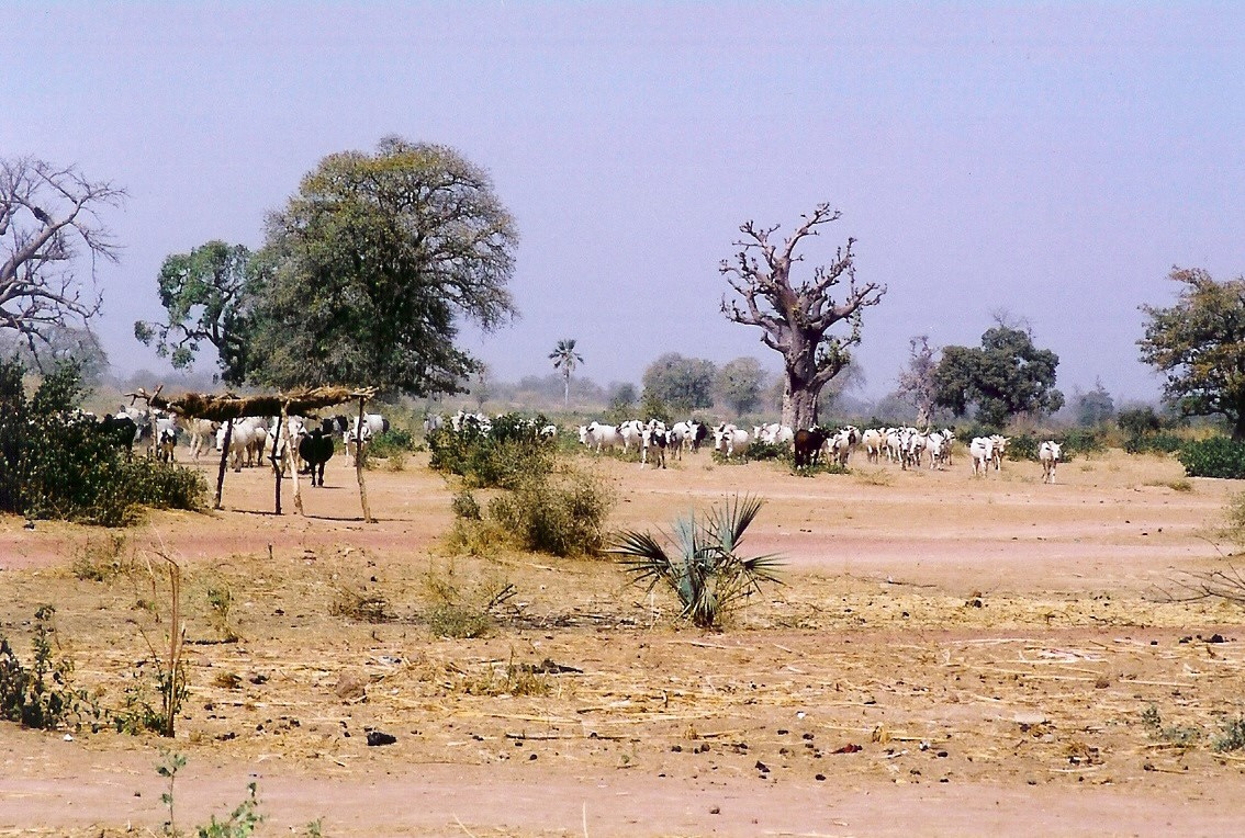 Troupeau dans les environs de Bamako